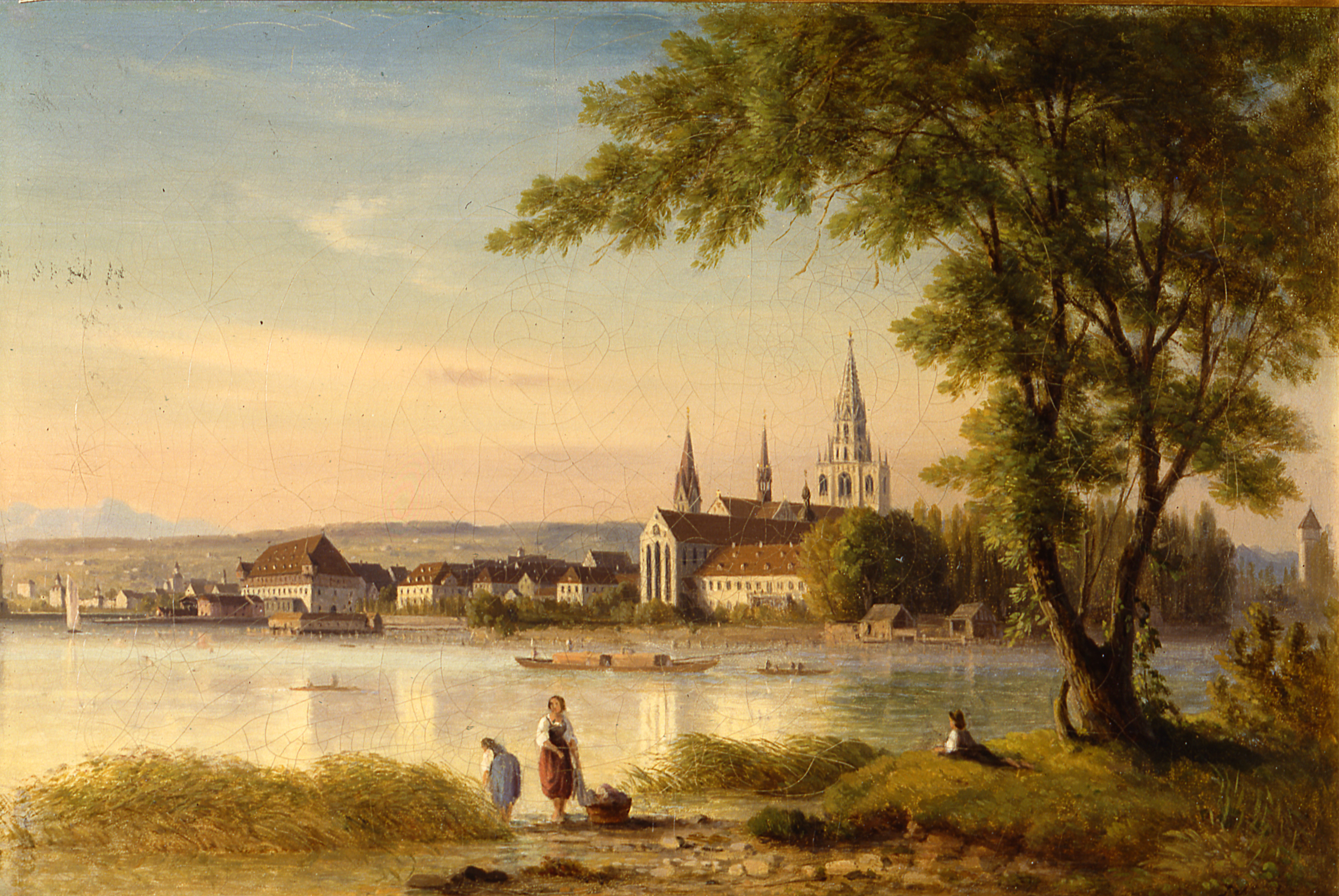 Joseph Moosbrugger: Konstanz; Öl auf Leinwand Bildmaß: 30 x 46,5 cm; Städtische Wessenberg-Galerie Konstanz, erworben mit Mitteln der Baden-Württemberg-Stiftung gGmbH Inv. Nr.: 89/667 (W.D.St.)